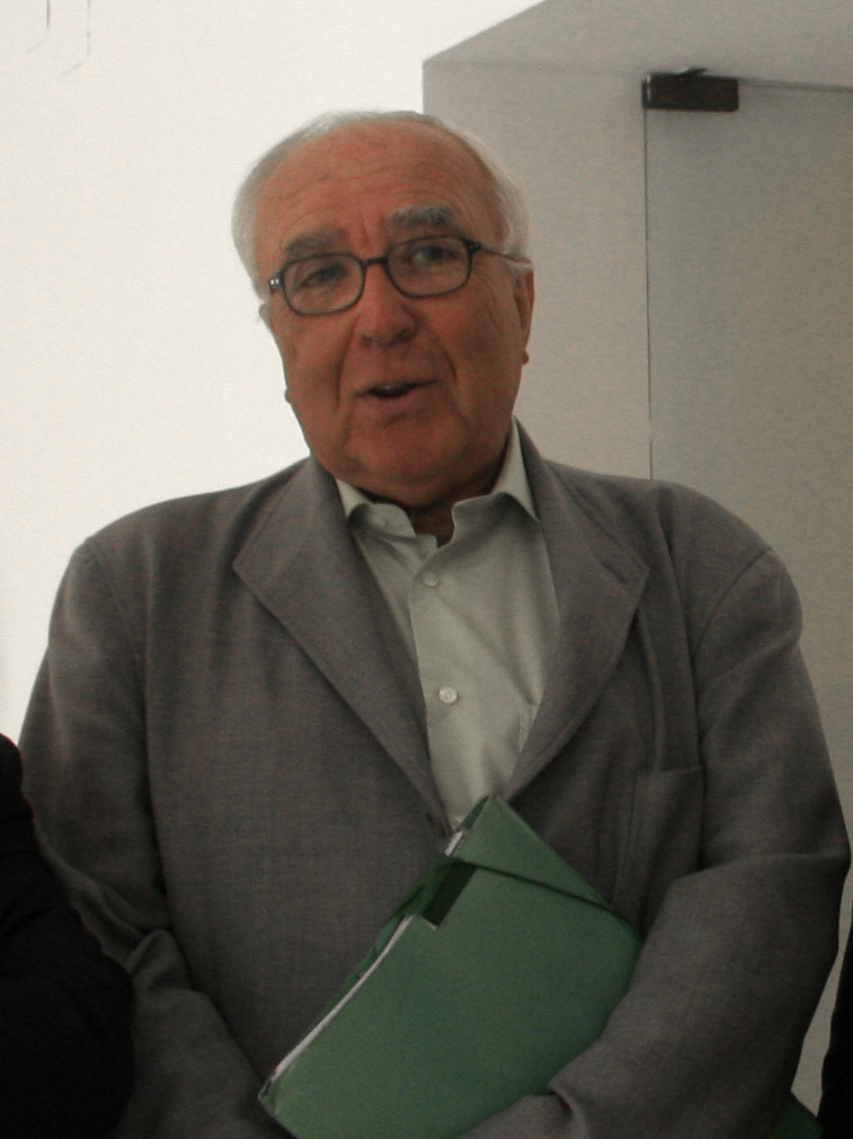 De izquierda a derecha: Manuel Ángel Vázquez Medel, Román Gubern, María García-Doncel y Rafael Utrera Macías. Curso "De la Literatura al Cine. Del Cine a la Literatura" (Cursos de Verano 2007 de la Universidad Internacional de Andalucía.